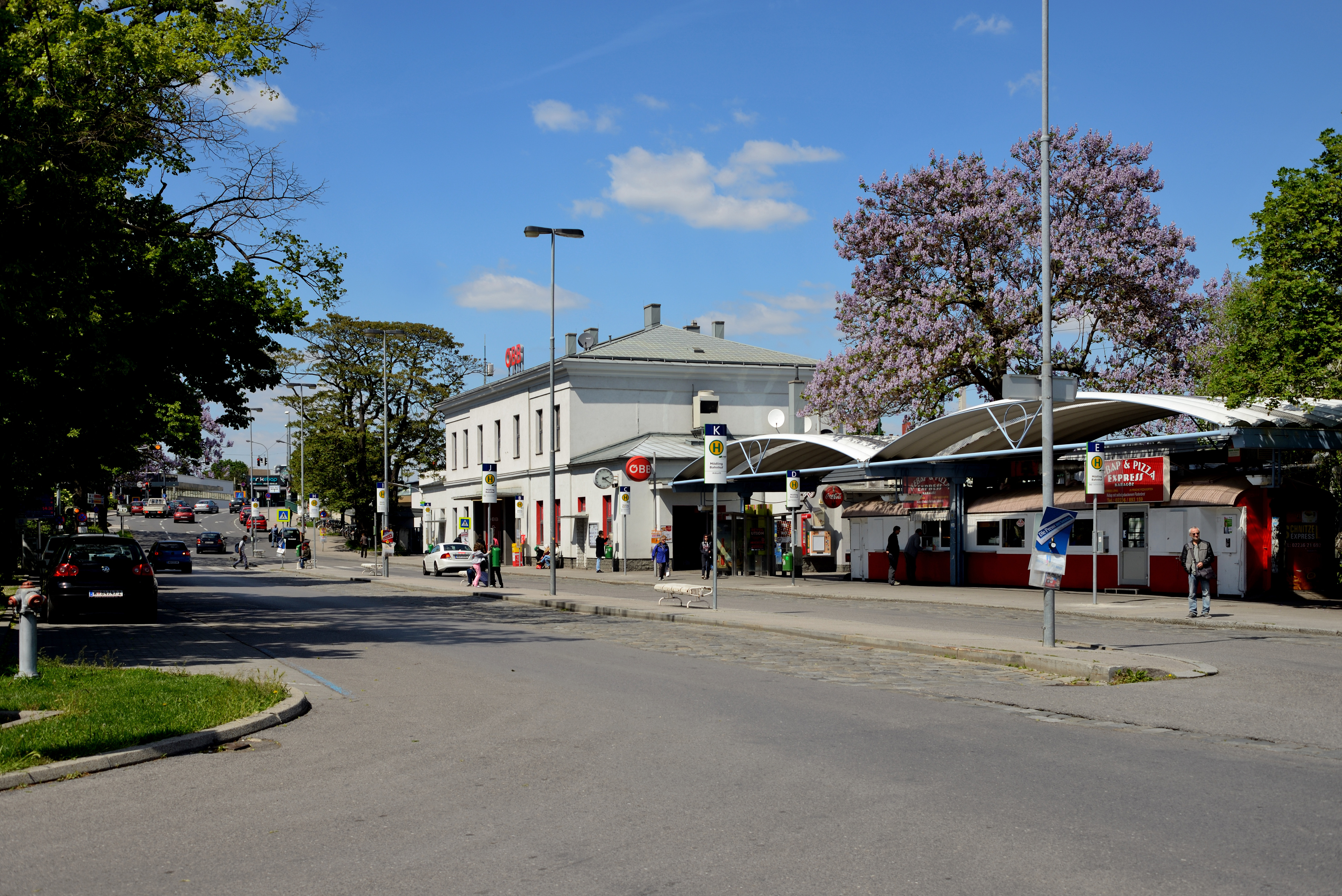 Busbahnhof vor dem Mödlinger Bahnhof